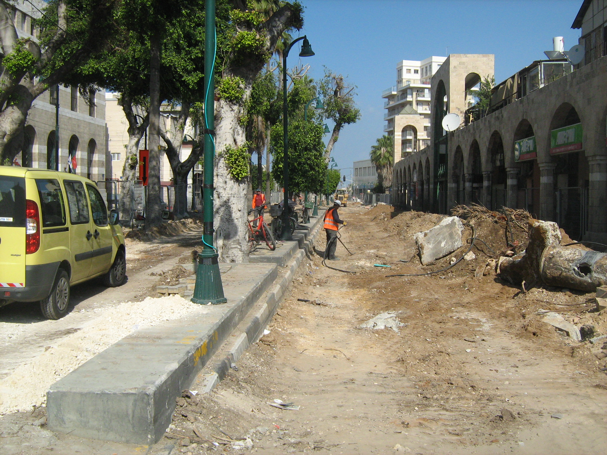 שד' ירושלים, 6 פברואר 2009